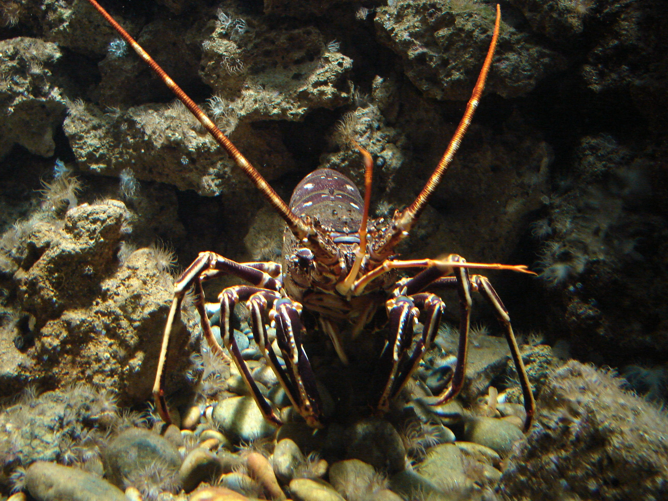 Langouste Rouge Palinurus elephas. Aquarium de Rhodes